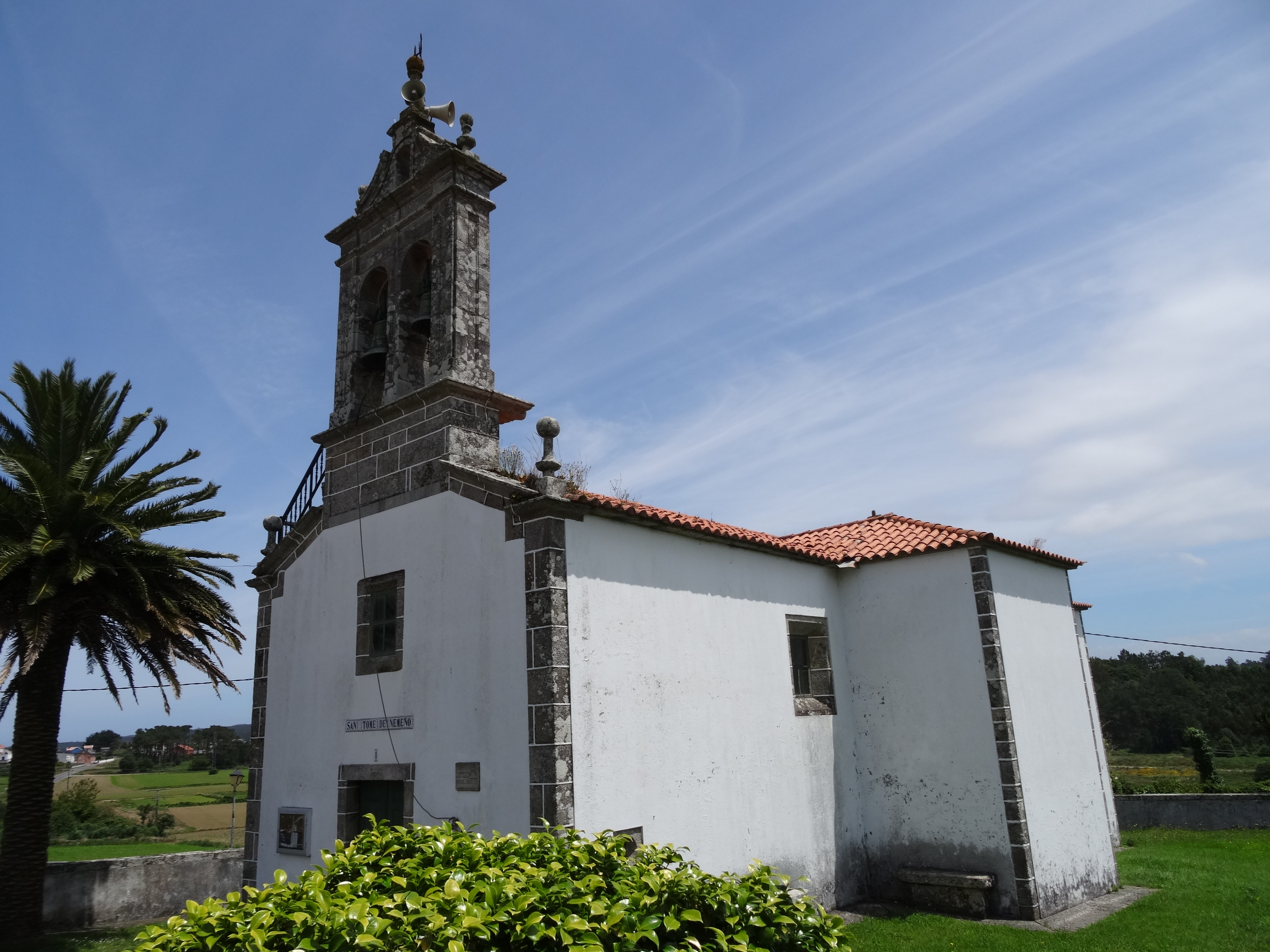 Igrexa de San Tomé de Nemeño, Ponteceso